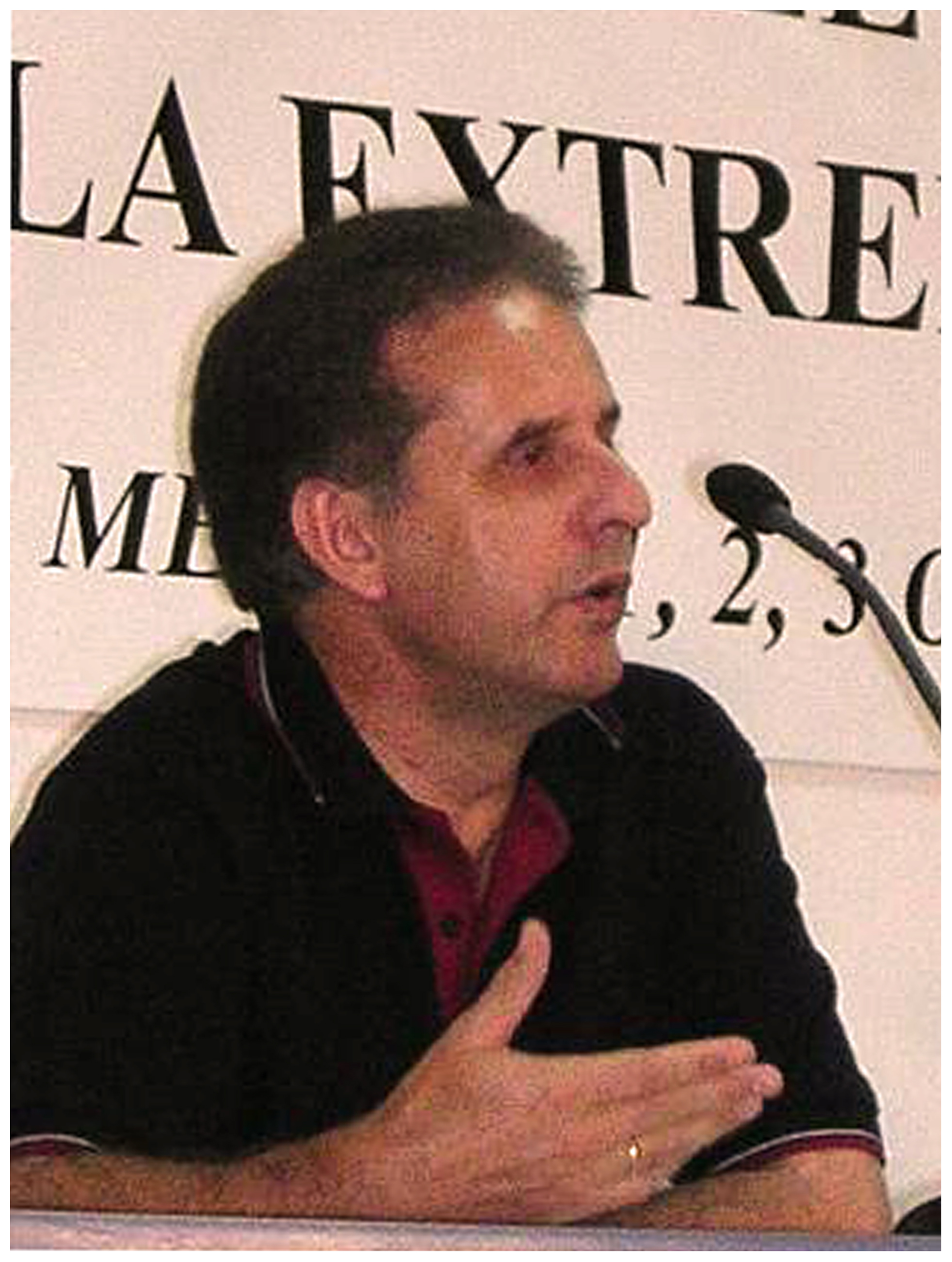 Estremeñu: José María Alcón Olivera nel II Congreso del Habla Extremeña en San Pedro de Mérida, Badajós.